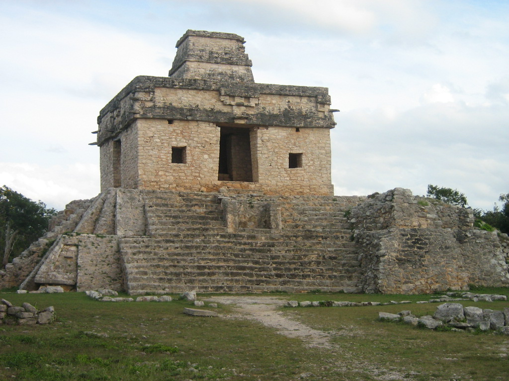 Templo de las Siete Muñecas. Dzibilchaltún, Yucatán, México